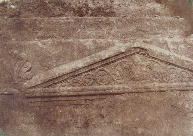 Fronton du Tombeau de Josaphat, Vallee de Josaphat - Jerusalem.